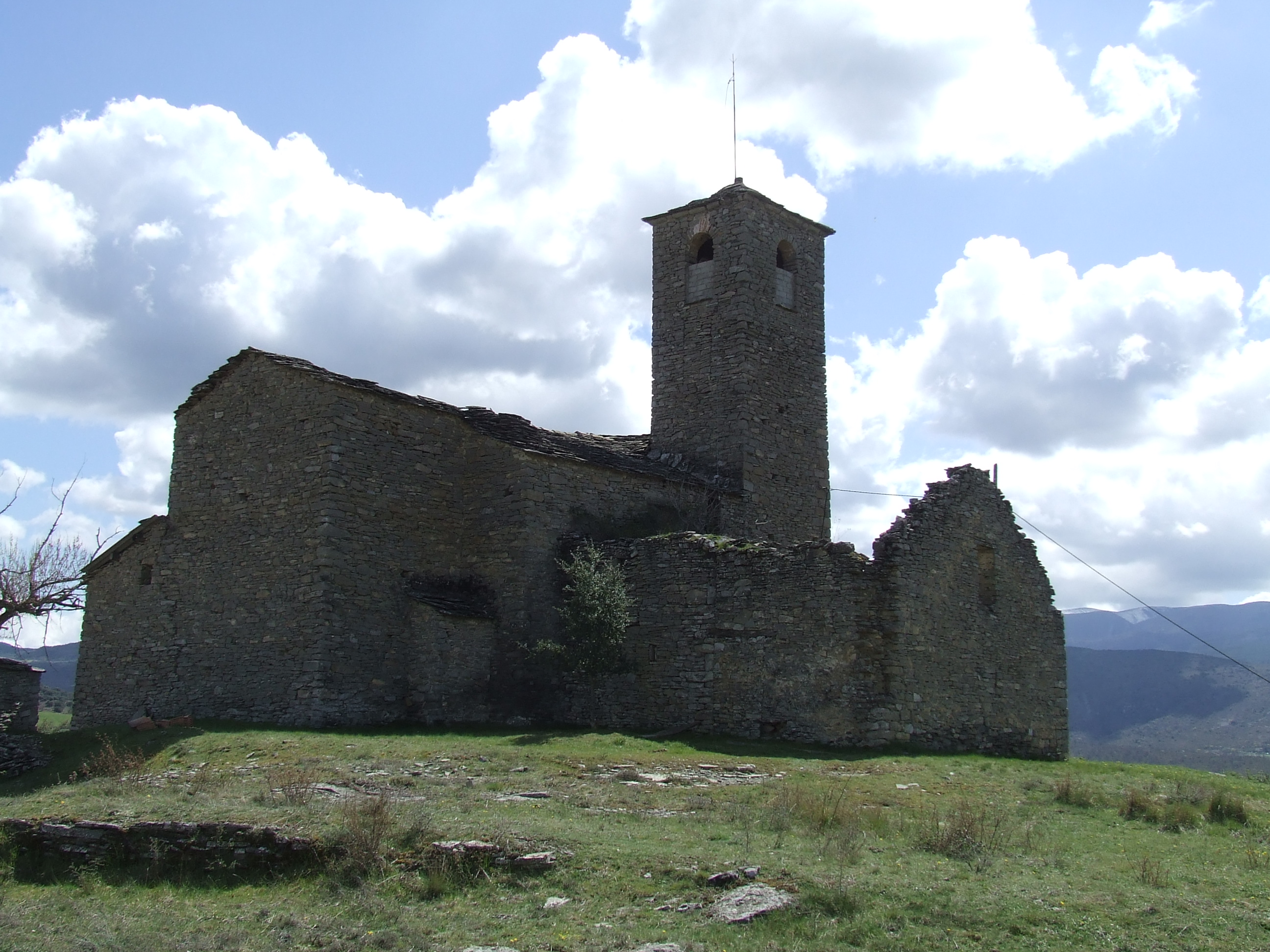 Restes -poques- del castell de Castissent (Fígols de Tremp, Tremp, Pallars Jussà)